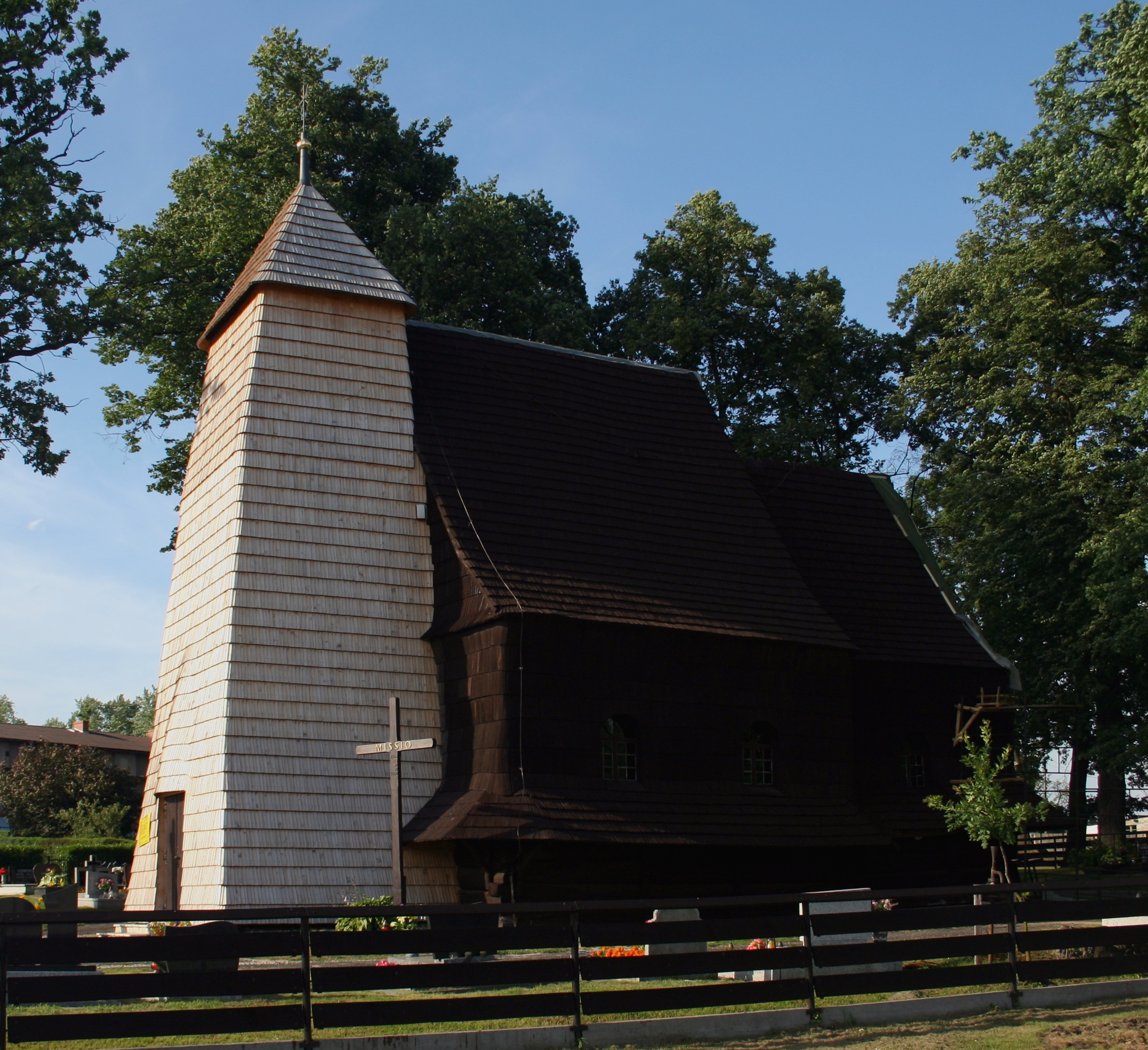 Kościół św. Wawrzyńca w Zacharzowicach, woj. śląskie